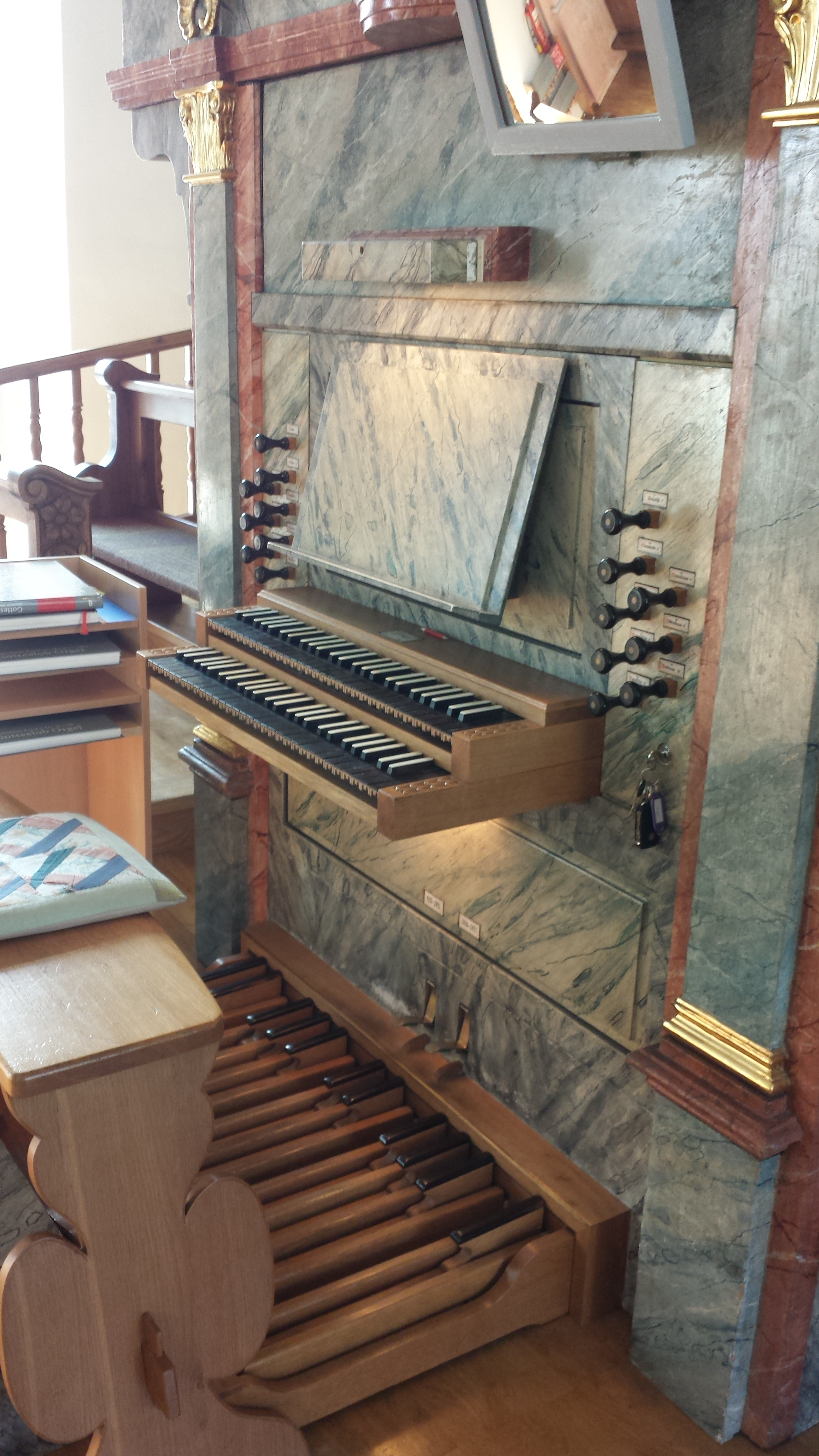 Spieltisch der Orgel in der St. Stephanskirche in Thüringen (Vorarlberg)